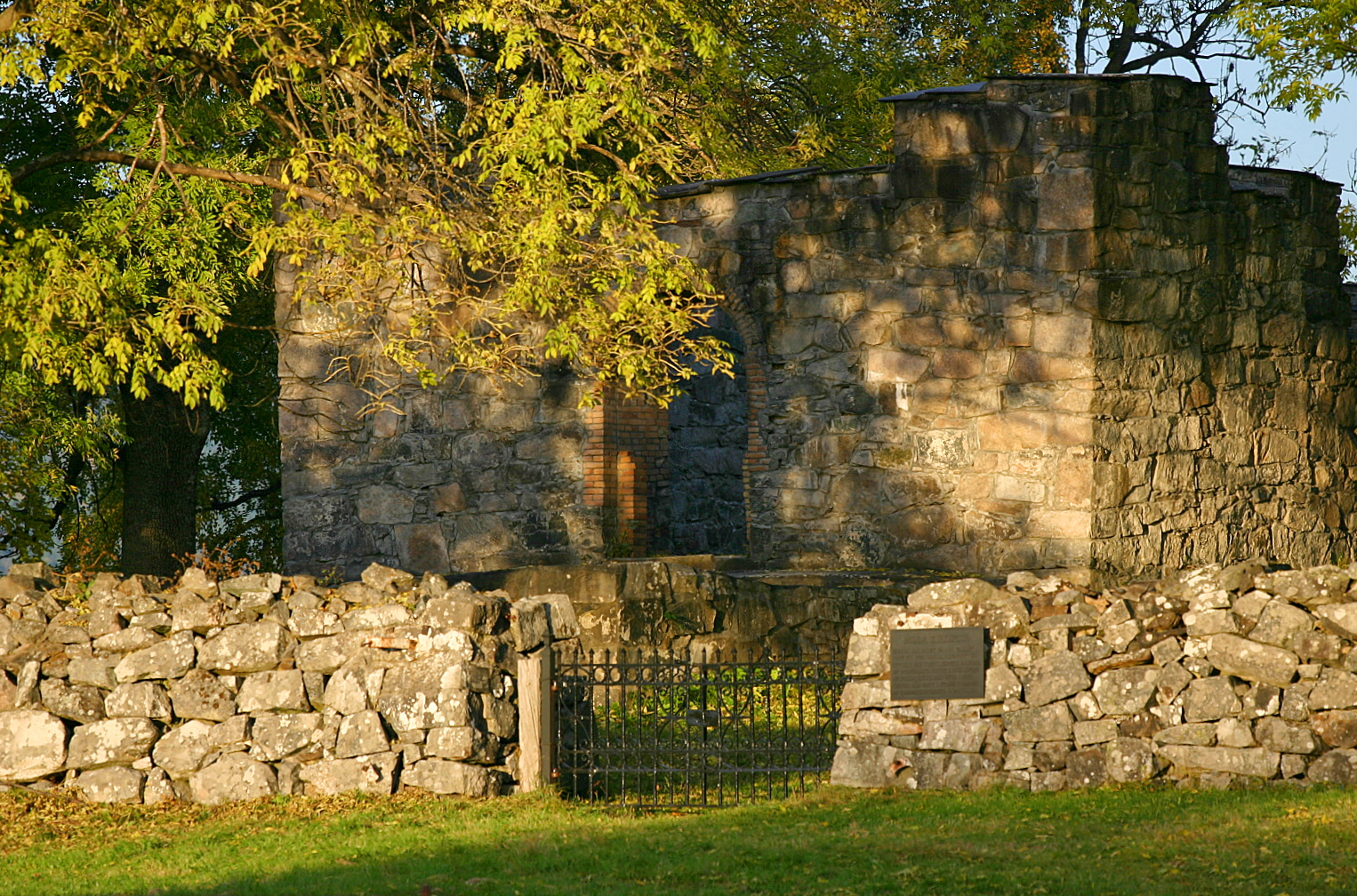 Holla kyrkjeruin